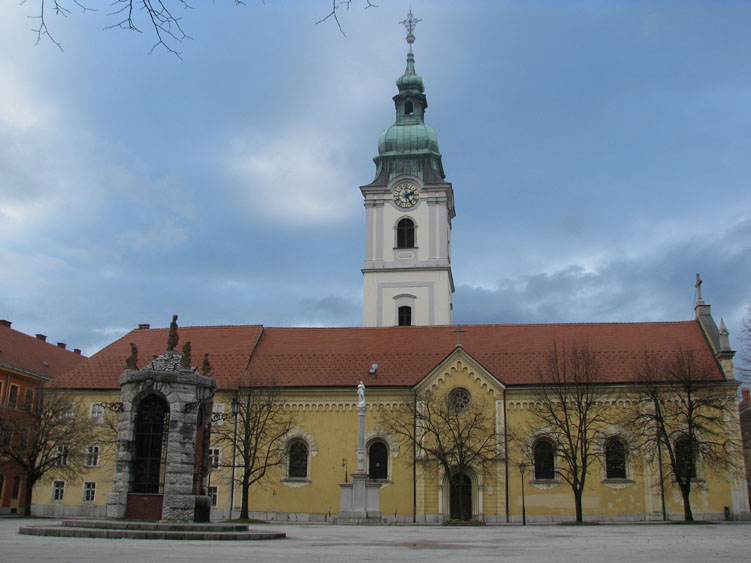 Franjevački samostan i Crkva Presvetog Trojstva u Karlovcu